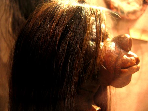 Shrunken head. Pitt Rivers Museum, Oxford.